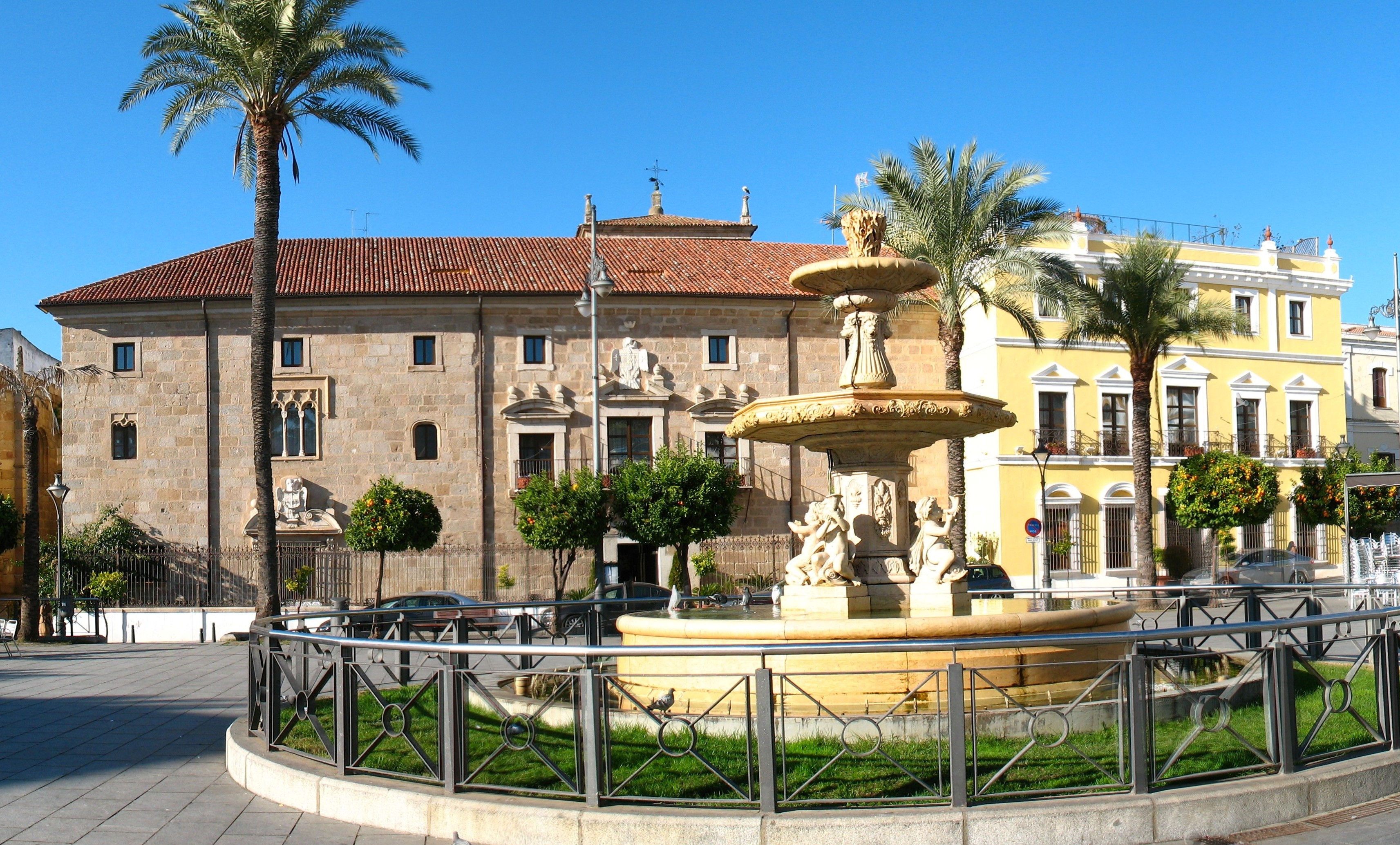 Panorámica de la Plaza Mayor de Mérida (España)